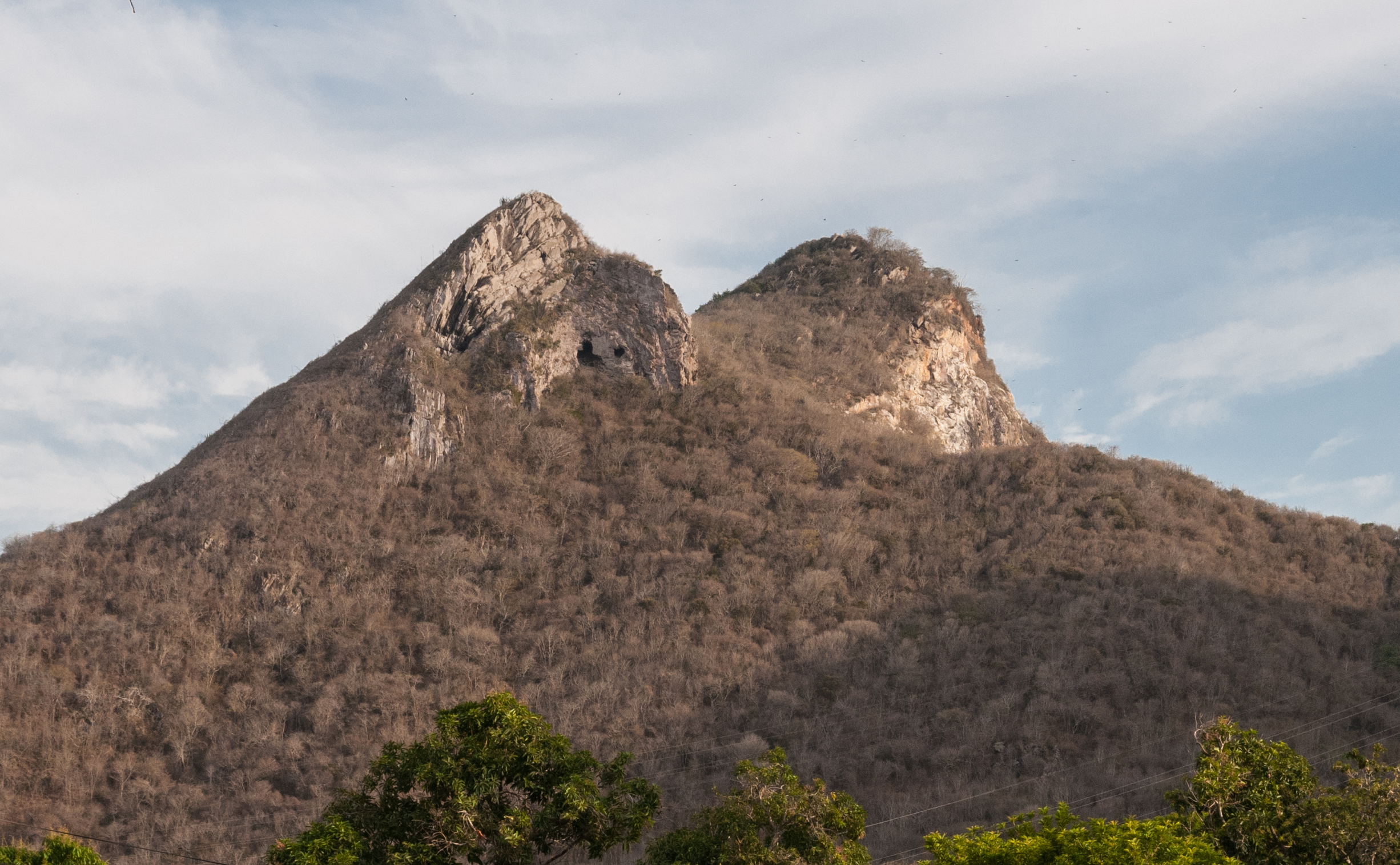 Cueva de la bruja ubicada en el cerro El Piache, El Valle del Espíritu Santo, Isla Margarita